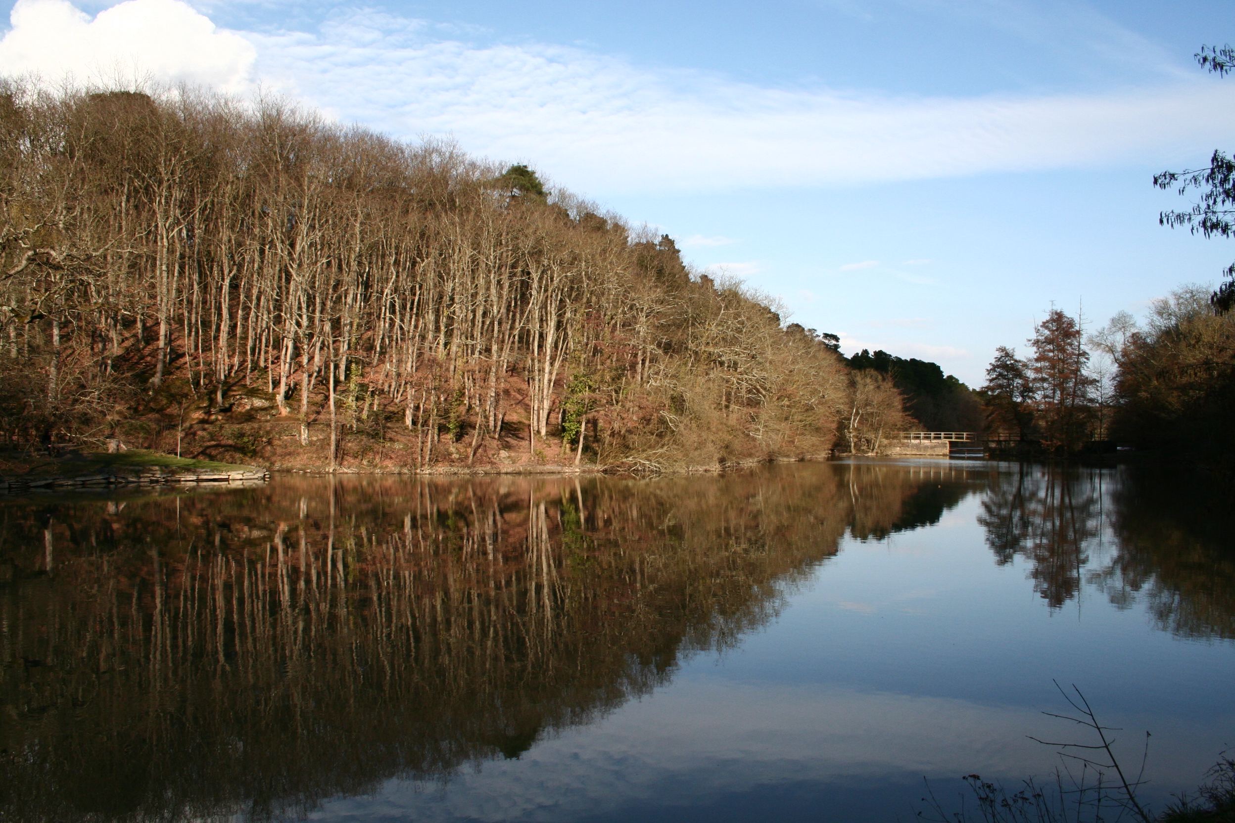 Etang Saint-Nicolas en hiver